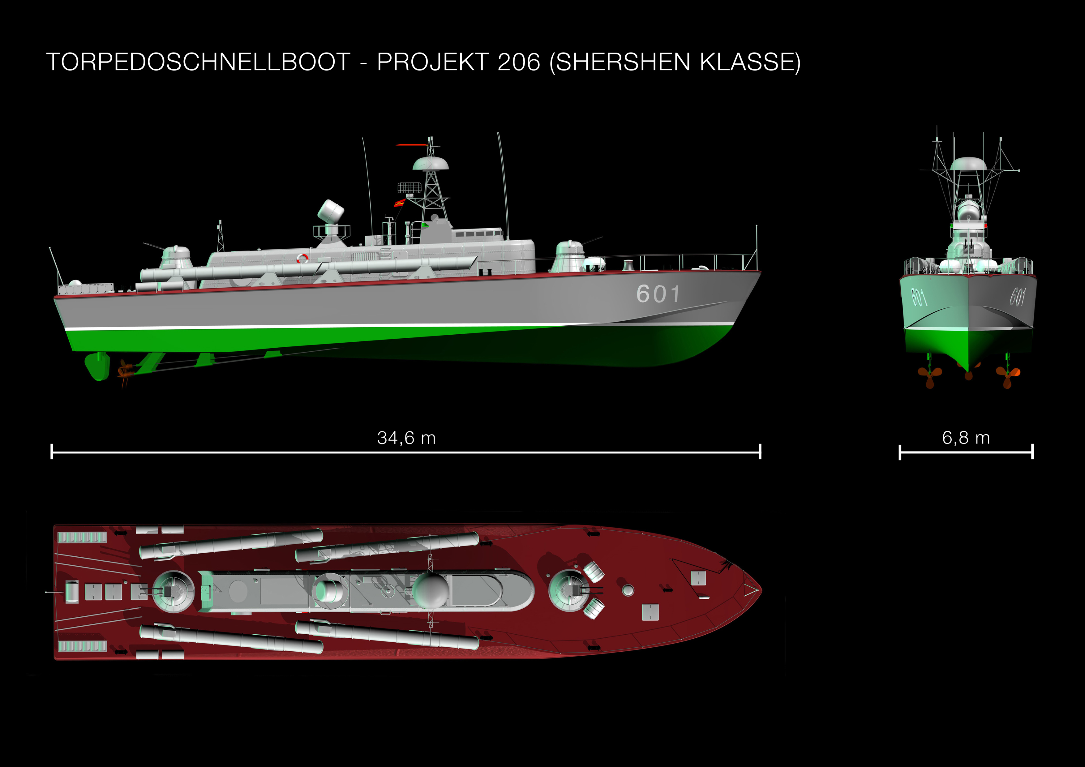 eine Darstellung in drei Ansichten des Torpedoschnellbootes Projekt 206 (Shershen Klasse) der Volksmarine der DDR